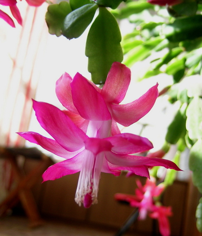 蟹爪兰 smartneddy 2004年12月摄